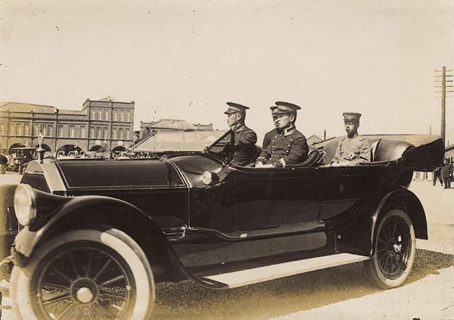 中文（台灣）: 裕仁太子於西元1923（大正12年）來台時乘坐豪華敞篷禮車南下至台南巡視。